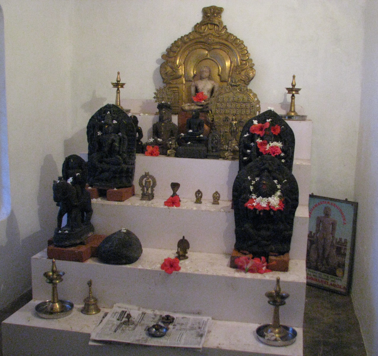 പാലക്കാട് ജൈനമേടിലെ ജൈനക്ഷേത്രത്തിലെ വിഗ്രഹങ്ങളുടെ ചിത്രം. ക്ഷേത്രത്തിന്റെ പുനരുദ്ധാരണപ്രവർത്തനം നടക്കുന്നതിനാൽ വിഗ്രഹങ്ങൾ ക്ഷേത്രത്തിനു് സമീപമുള്ള ഒരു ജൈനഭവനത്തിൽ സൂക്ഷിച്ചിരിക്കുന്നു.